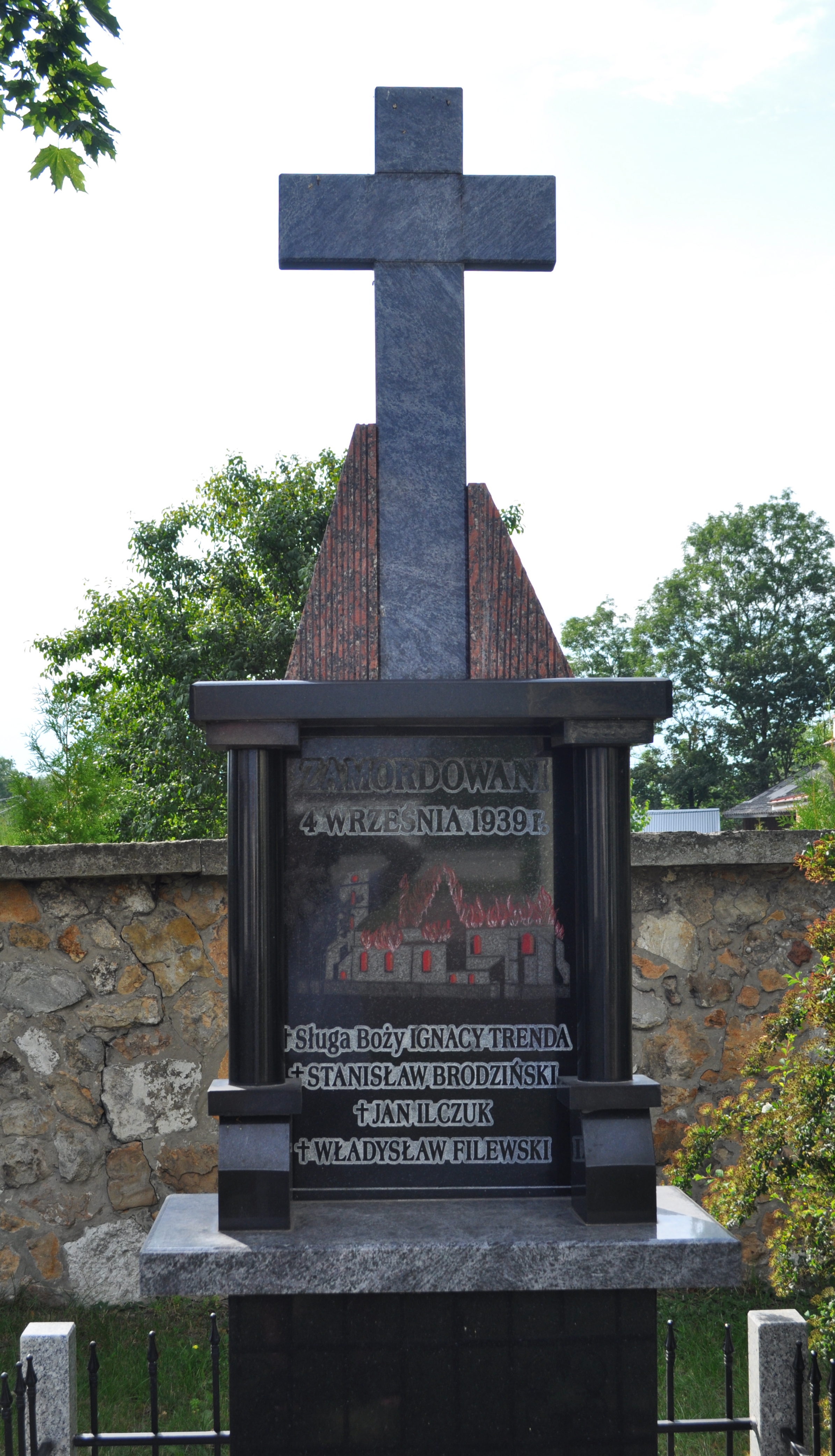 Ten obiekt znajduje się w Ewidencji Miejsc Pamięci Województwa Śląskiego dla miejscowości Lelów pod numerem 109/03.Opis